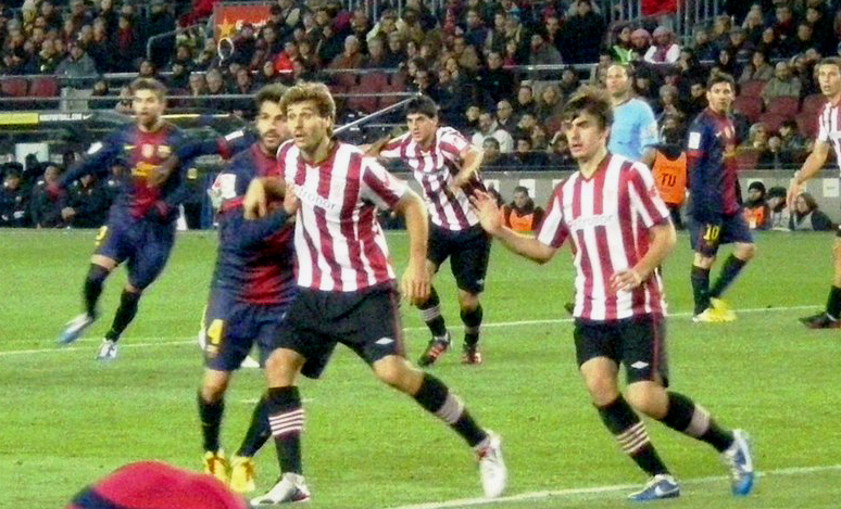 El jugador español Fernando Llorente en el Camp Nou. Barcelona-Athletic el 1 de Diciembre de 2012.